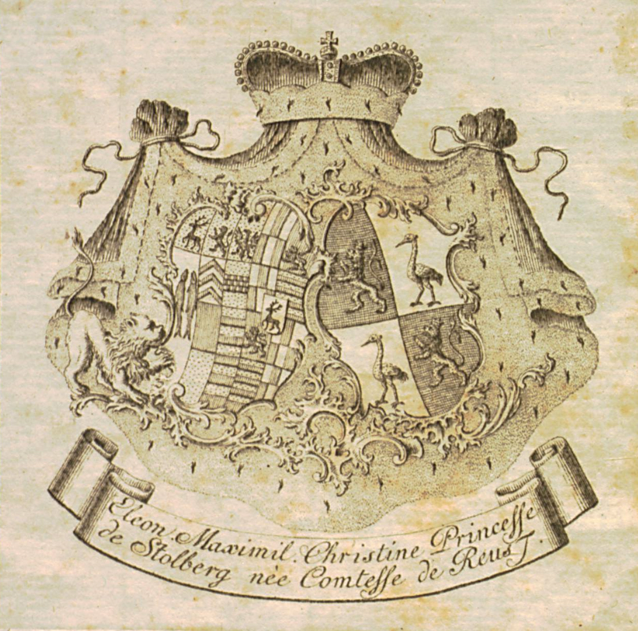 Wappen-Ex-Libris der Eleonore Maximiliane Christine Fürstin von Stolberg-Gedern, geb. Gräfin von Reuß (1737–1782); Gattin des Fürsten Christian Karl zu Stolberg-Gedern (1723-1764)